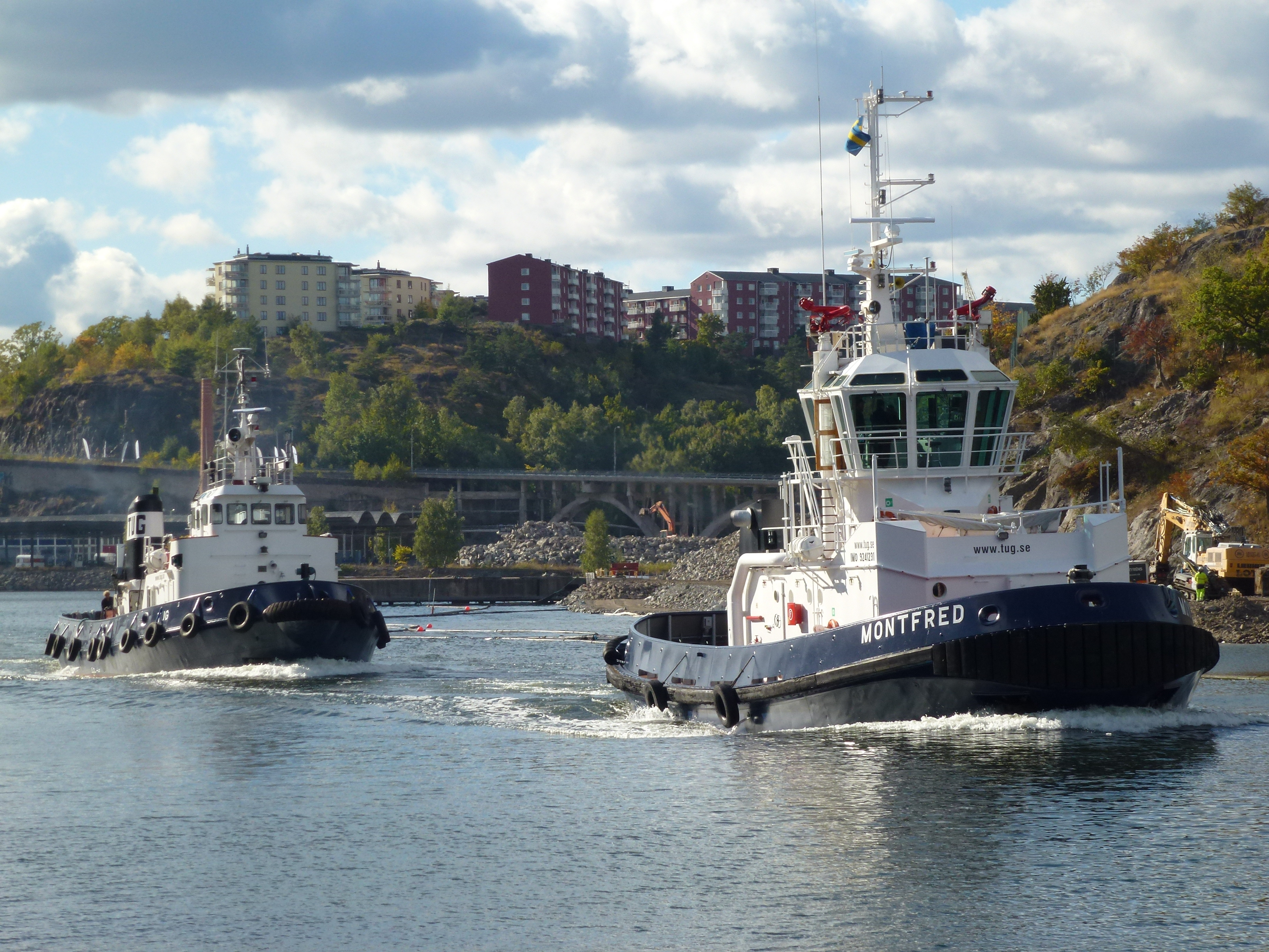 Bogserbåtarna Montfred och Tug i Svindersviken med Kvarnholmsbron i bakgrunden